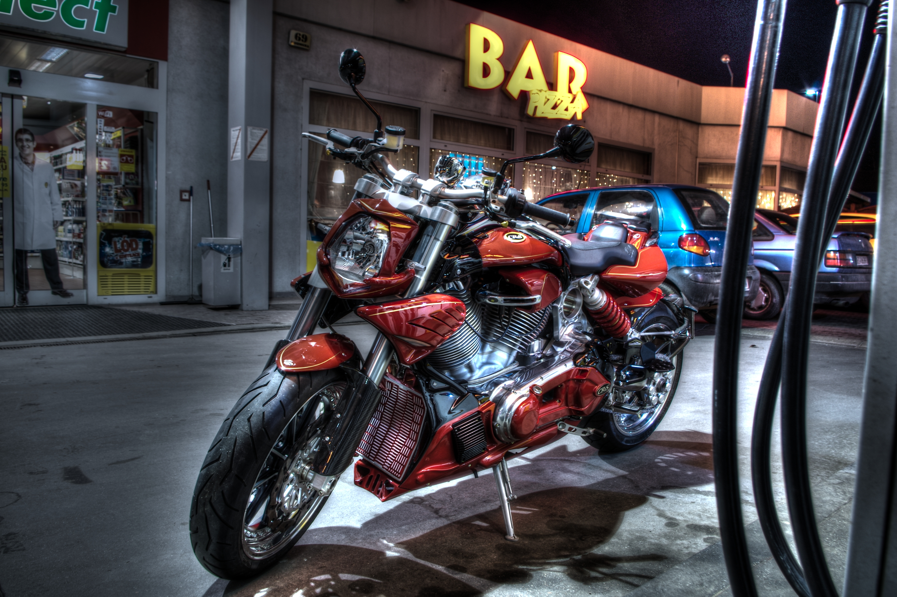 Ekskluzywny motocykl CR&S DUU włoskiej produkcji. Zdjęcia wykonano dzięki importerowi firmie K+K z Dzierżoniowa.